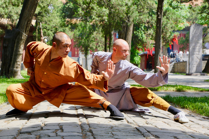 Kung Fu Portrait